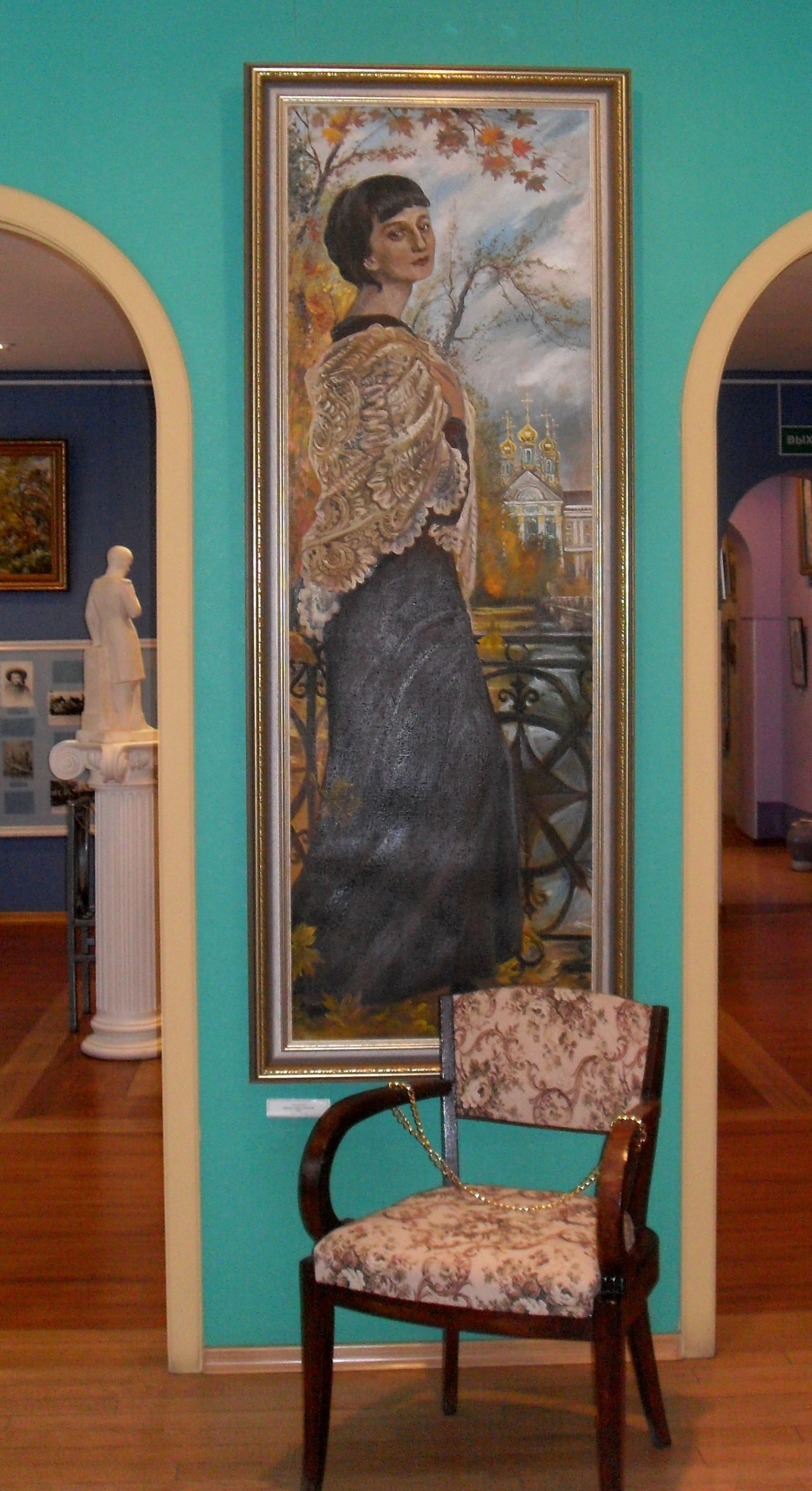 "Портрет Анны Ахматовой в рост", Алексеев В.И., 1992, холст, масло